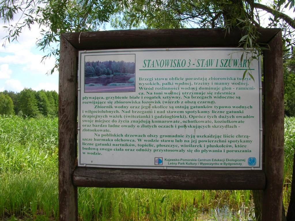 Tablica ścieżki ekologicznej w Myślęcinku